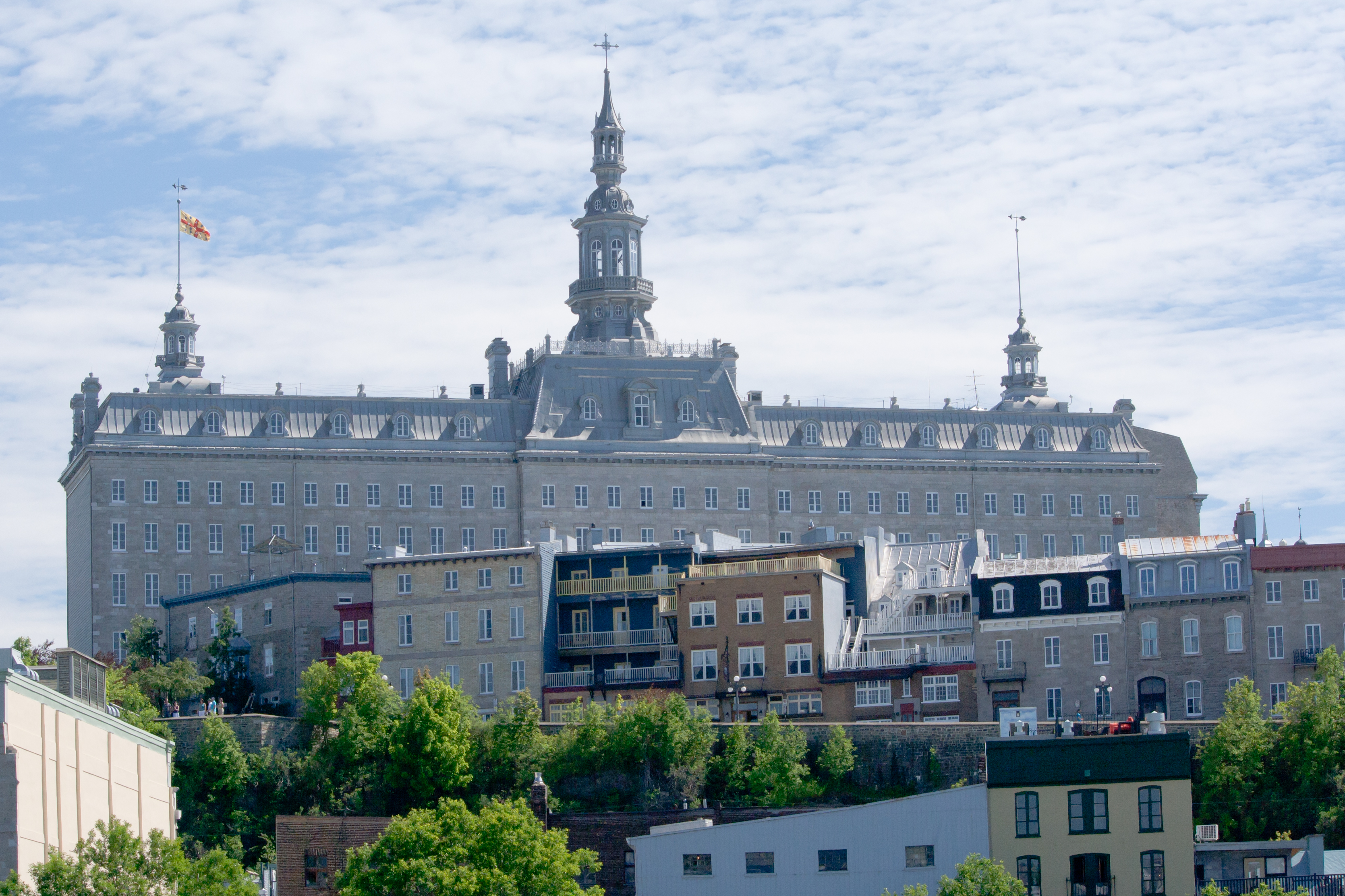 Vu du Bassin Louise